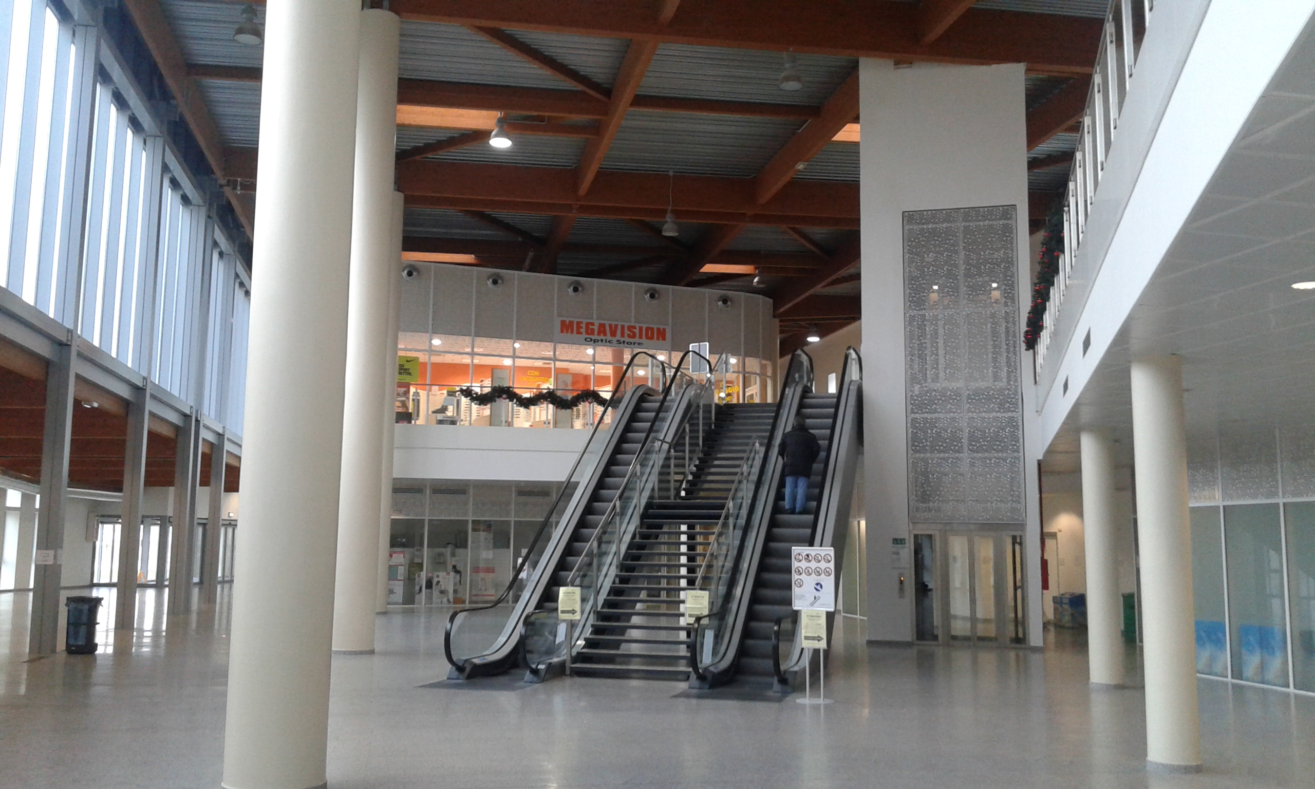 Arcispedale Sant'Anna